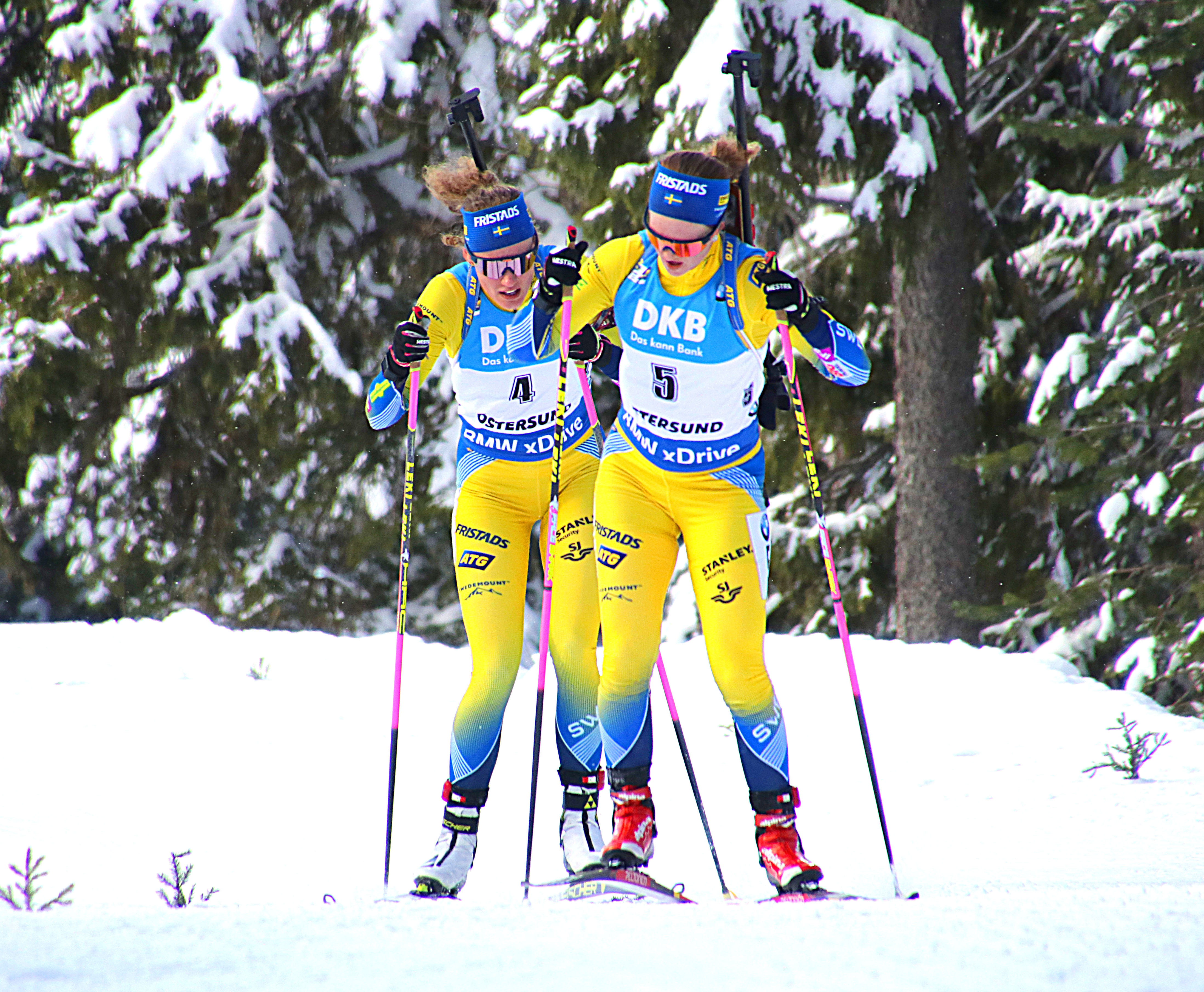 Östersund. Mona Brorsson och Hanna Öberg på skidskytte-VM.